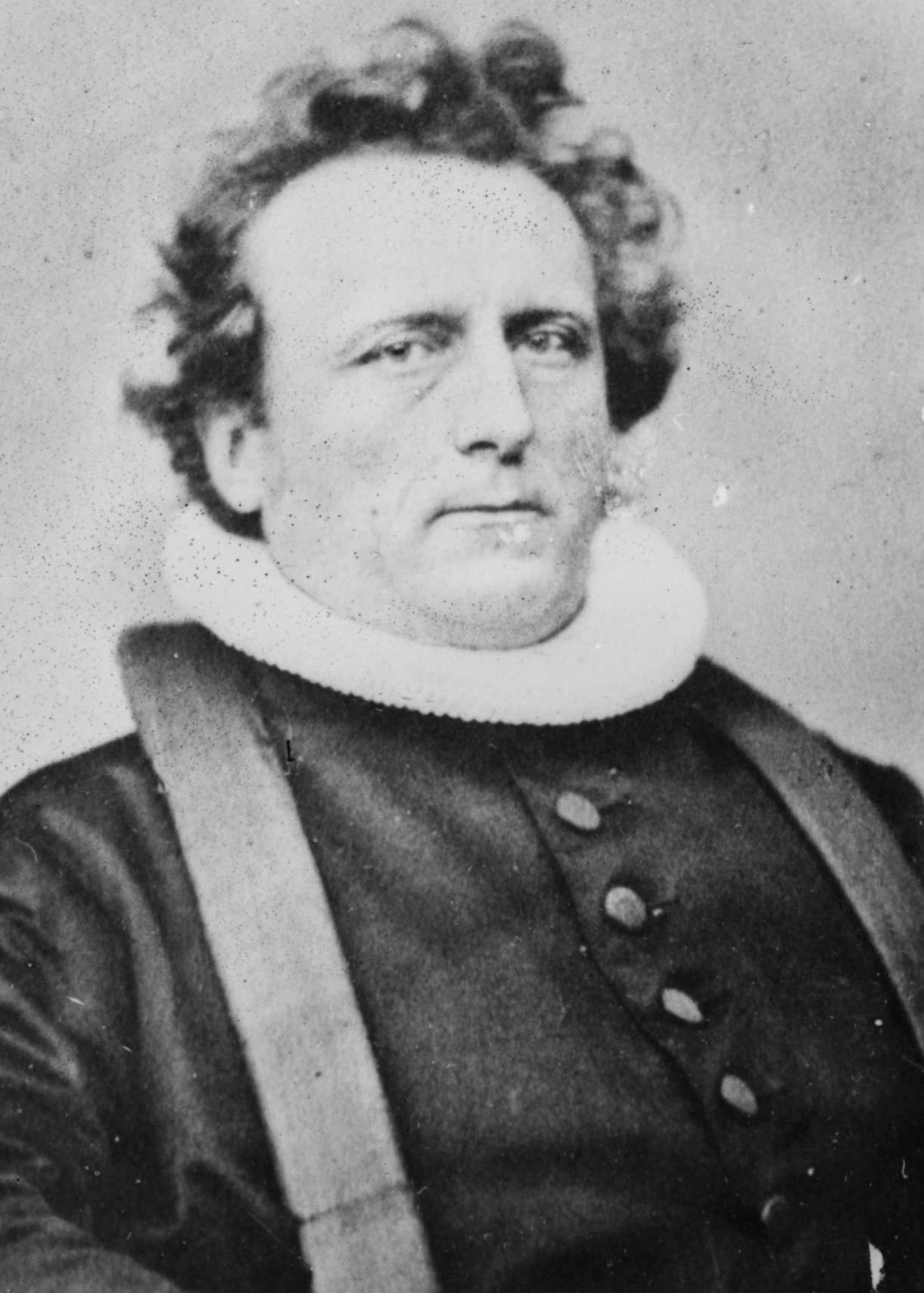 Bernhard Ludvig Essendrop (1812–1891), sogneprest i Strinda, Bakklandet og Domkirken, og stiftsprost.